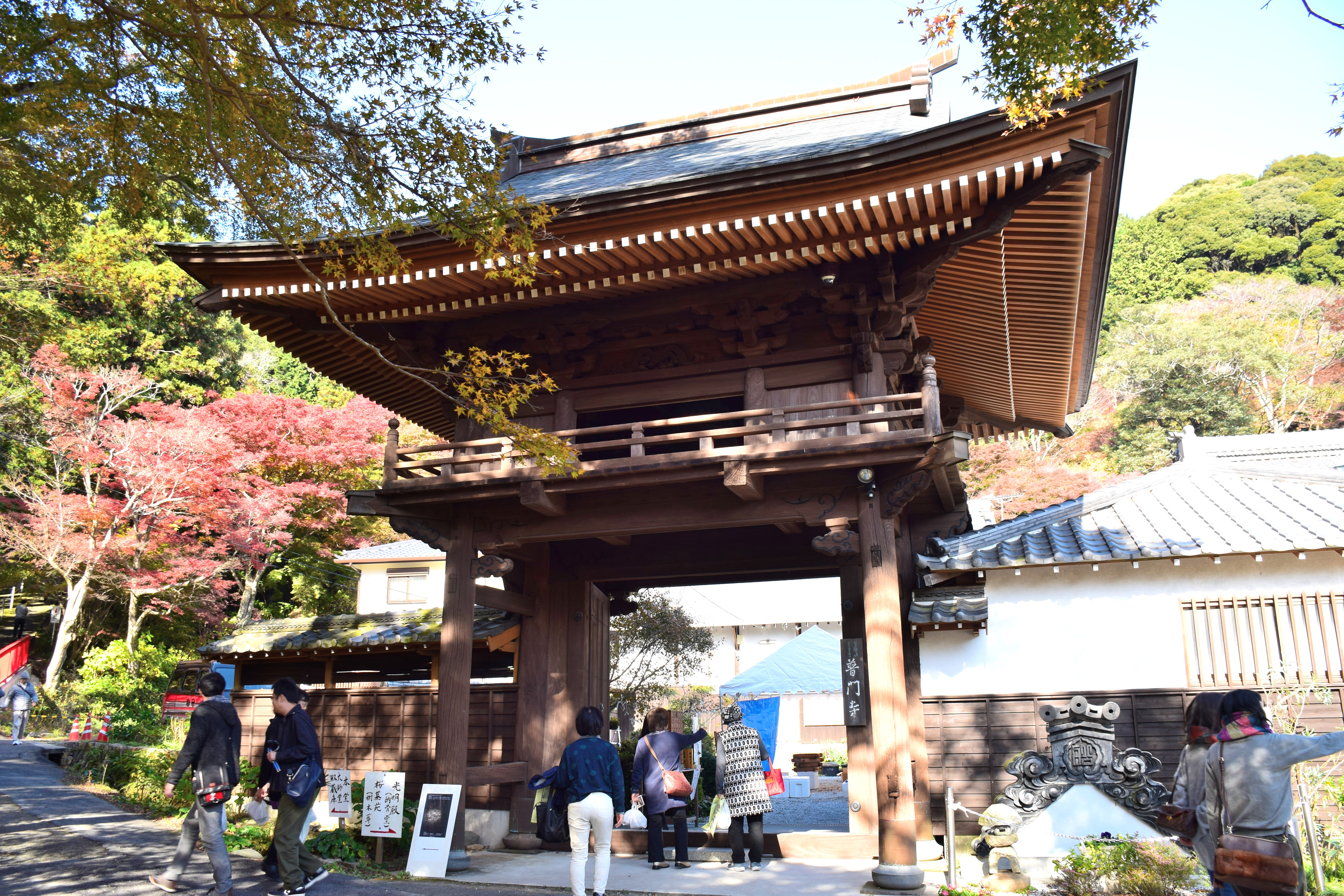 普門寺の鐘楼門